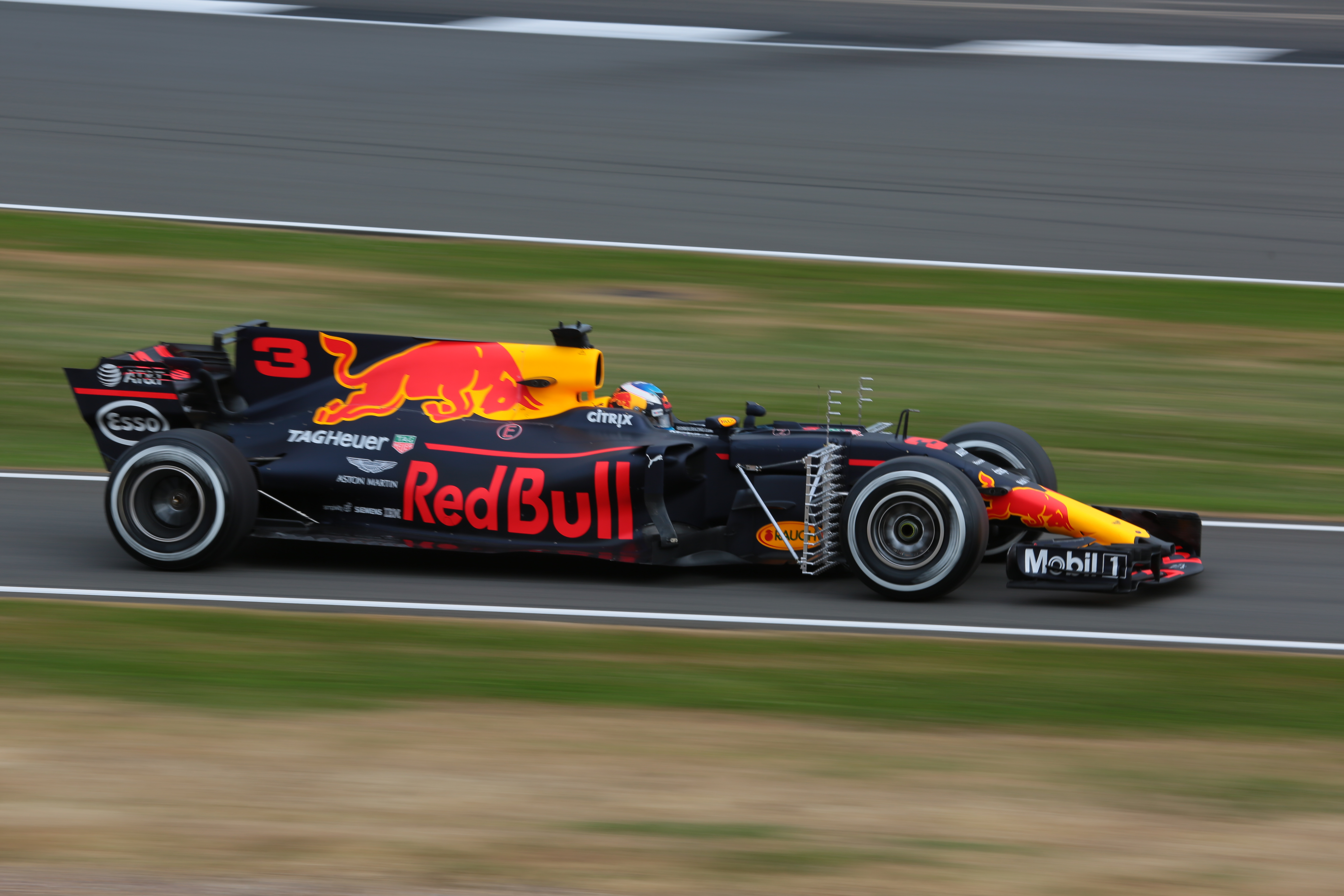 f1